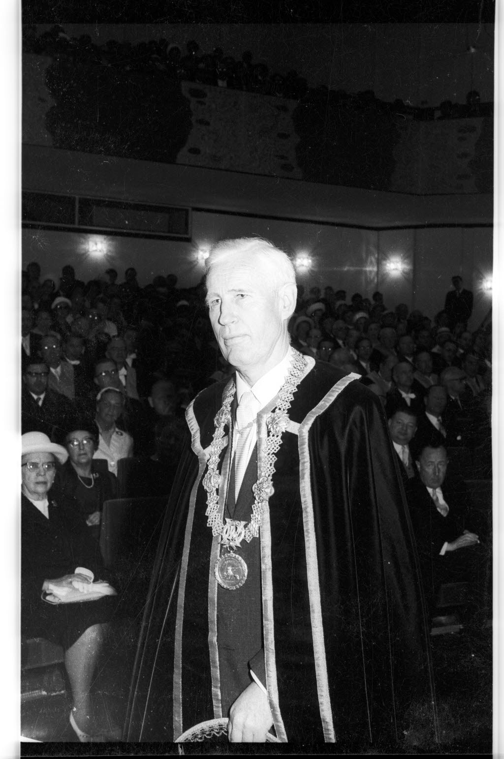 Erster Festakt in der Konzerthalle am Schloss. Verleihung der Ehrenbürgerschaft an den Vizekanzler und Rektor der Universität Lund Prof. Dr. Philip Sandblom für seine Verdienste auf dem Gebiet der Chirurgie und in Dankbarkeit für die erfolgreiche Förderung der freundschaftlichen Beziehungen zwischen den Universitäten Lund und Kiel nach dem Zweiten Weltkrieg.